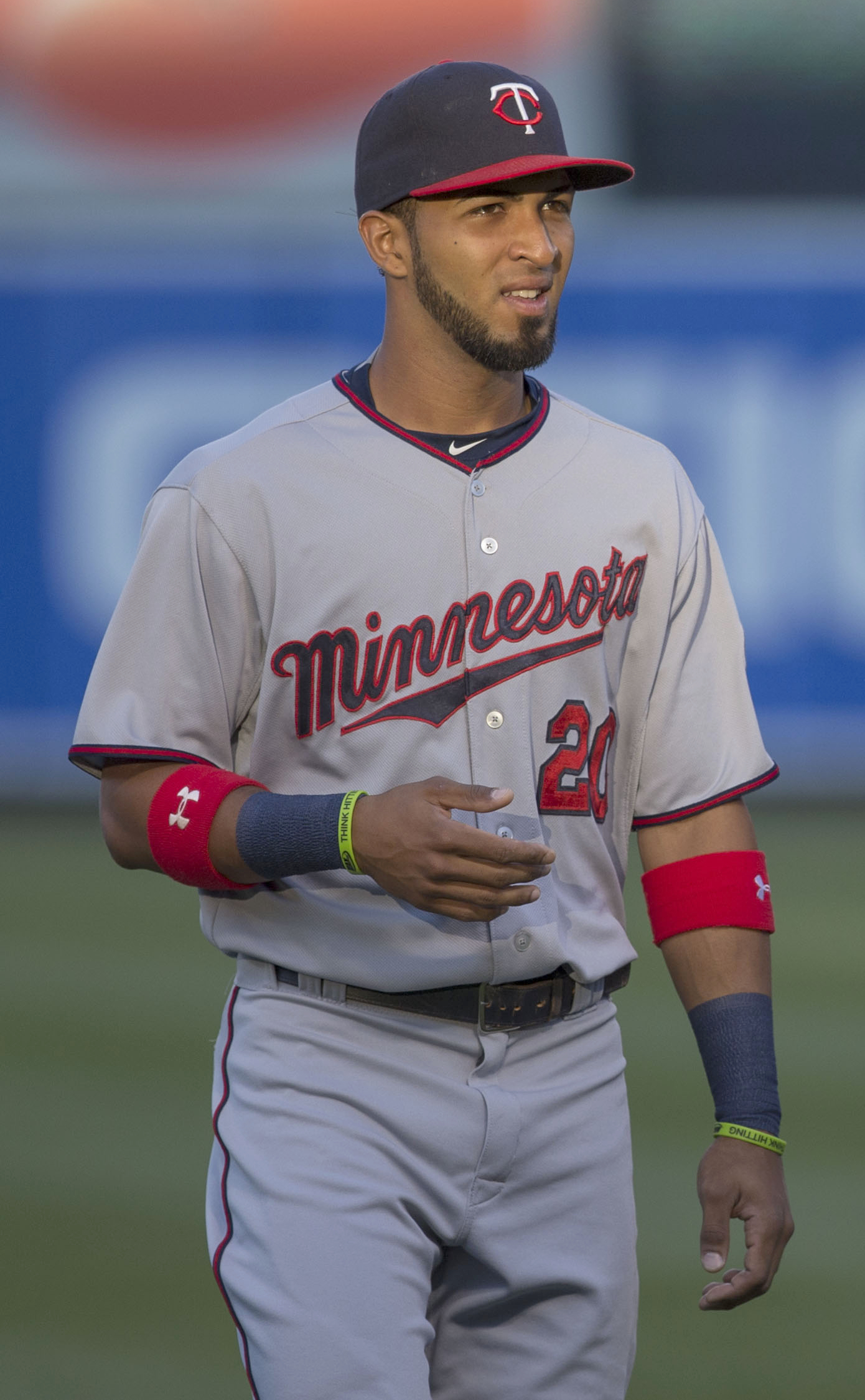 Eddie Rosario